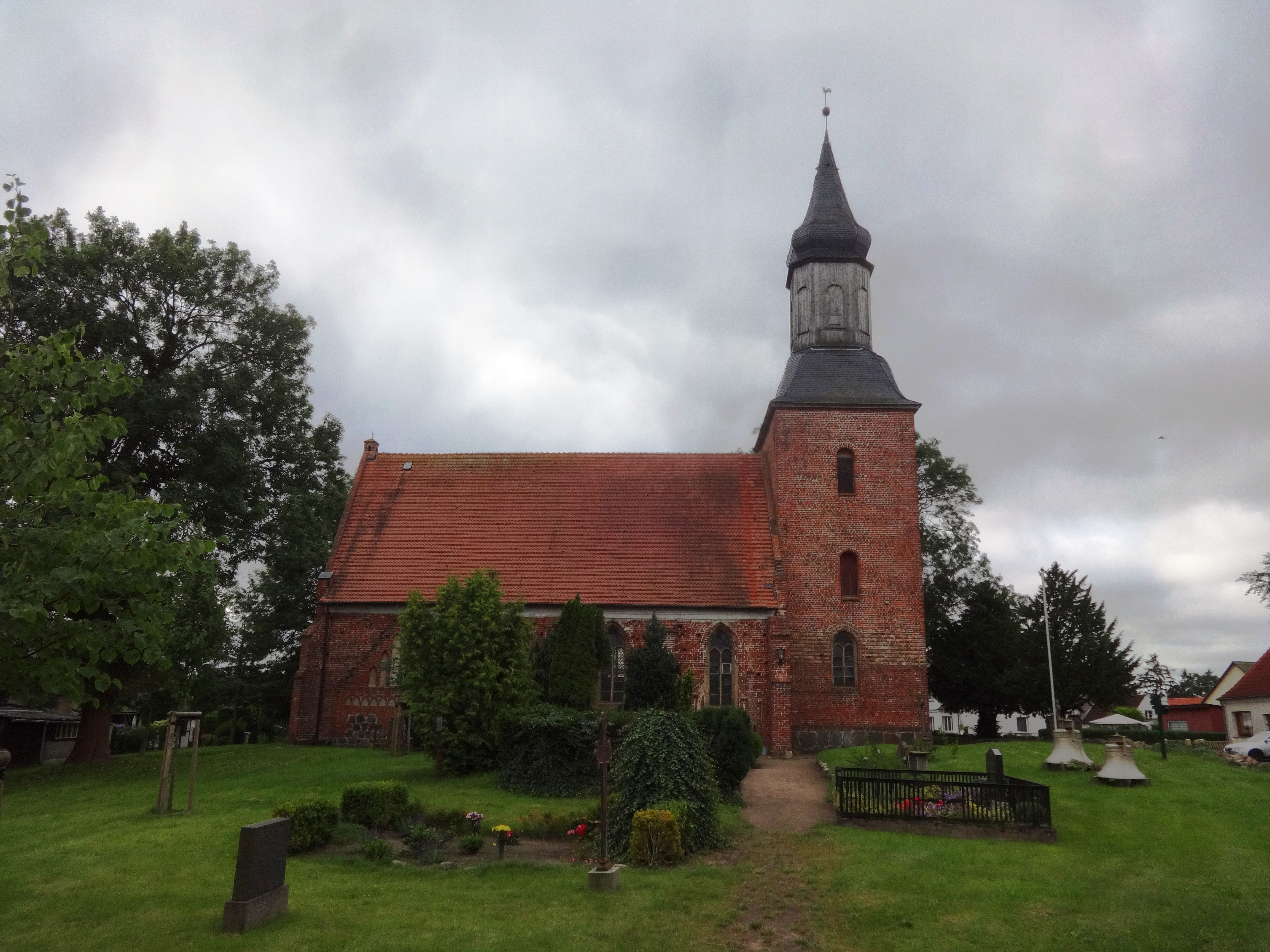 Die Kirche in Kröslin entstand vermutlich im 14. Jahrhundert. Im Innern befindet sich unter anderem ein Freester Fischerteppich.